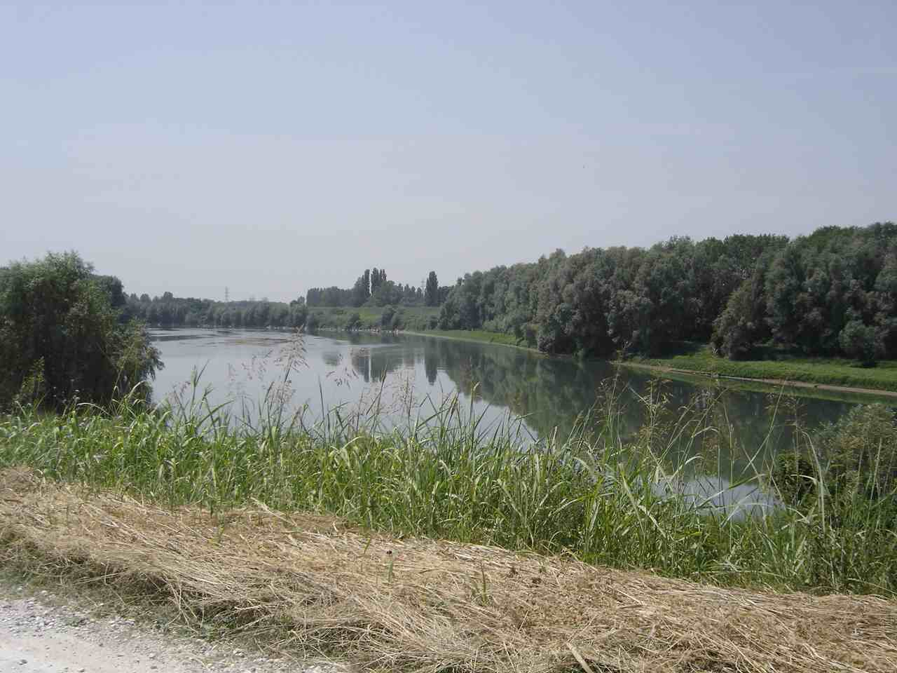 Adige near Bonavigo